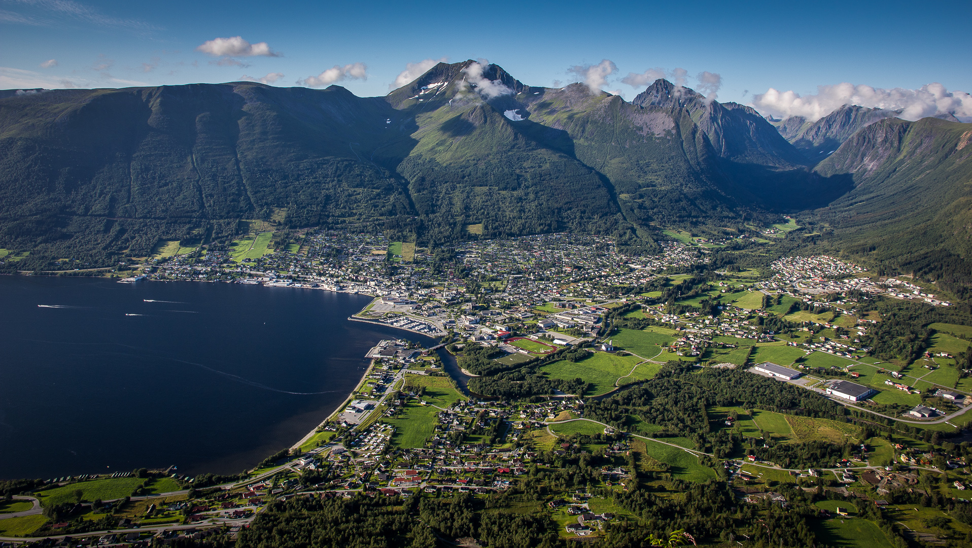 Ørsta sentrum tatt fra "Pølsa" (nær Melshorn)